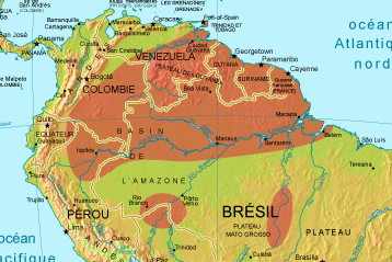 Matamata Distribution